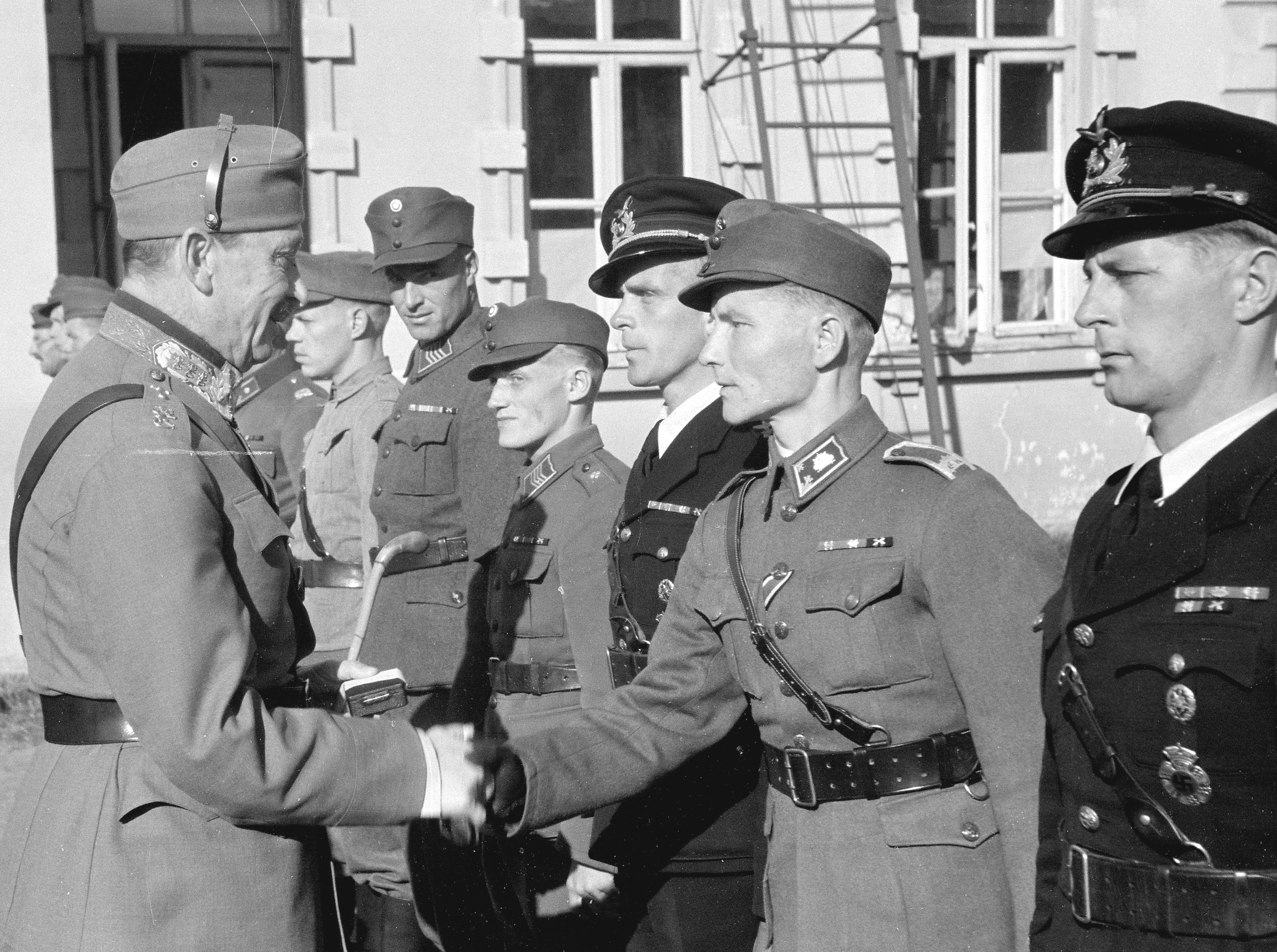 Marsalkka Mannerheim ojentaa Mannerheim-ristin kadetti Yrjö Keinoselle päämajassa syyskuussa 1942